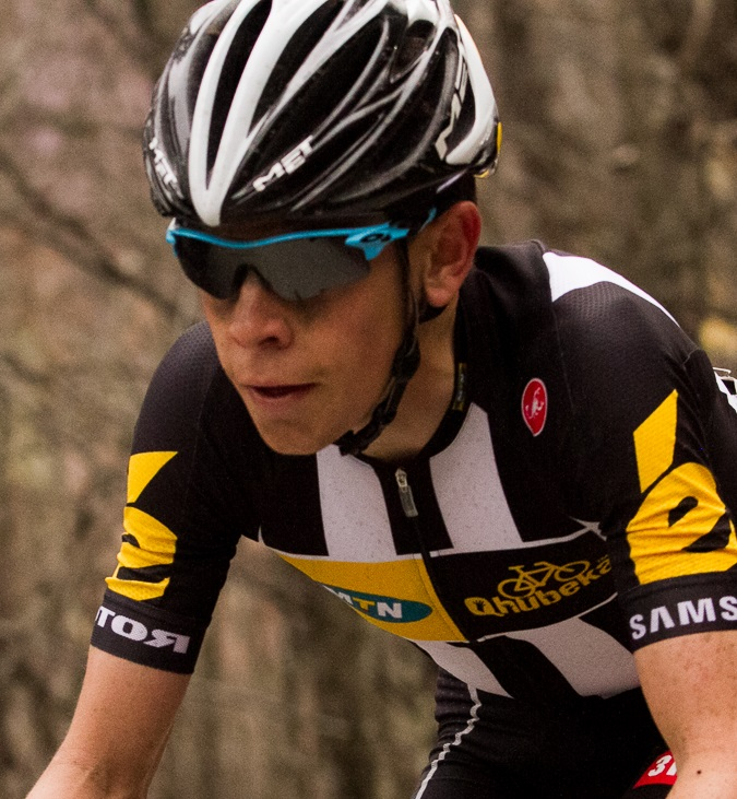 Louis Meintjes en la Eta4. Coppi e Bartali 2015.